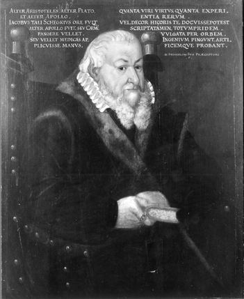 Portrait: Jakob Schegk (Degen), (1511-1587) Alleinstellungsmerkmal: Das älteste Gemälde in der Tübinger Professorengalerie Funktion: Professor, Philosophie, Medizin Beschriftung: „ALTER ARISTOTELES, ALTER PLATO, / ET ALTER APOLLO, / IACOBVS TALI SCHEGKIVS ORE FVIT / ALTER APOLLO FVIT, SEV CARME / PANGERE VELLET, / SEV VELLET MEDICAS AP / PLICVISSE MANVS,“ (o.l.) „QVANTA VIRI VIRTVS, QVANTA EXPERI / ENTIA RERVM. / VELDECOR HICORIS TE DOCVISSEPOTEST / SCRIPTATAMEN, TOTVMPRIDEM, / VVLGATA PER ORBEM. / INGENIVM PINGVNT, ARTI / FICEMQUE PROBANT. / .D.FRISCHLIN(US) SVO PRAECEPTORI. / .F.“ (o.r.) „J. Schegk / Phil. et Med.F.pict.1678“ (Rahmenschild) Literatur: Scholl Nr. 180 Material: Öl auf Holz Bildgröße: 59,5 cm x 48,5 cm Rahmengröße: 71,5 cm x 60,5 cm